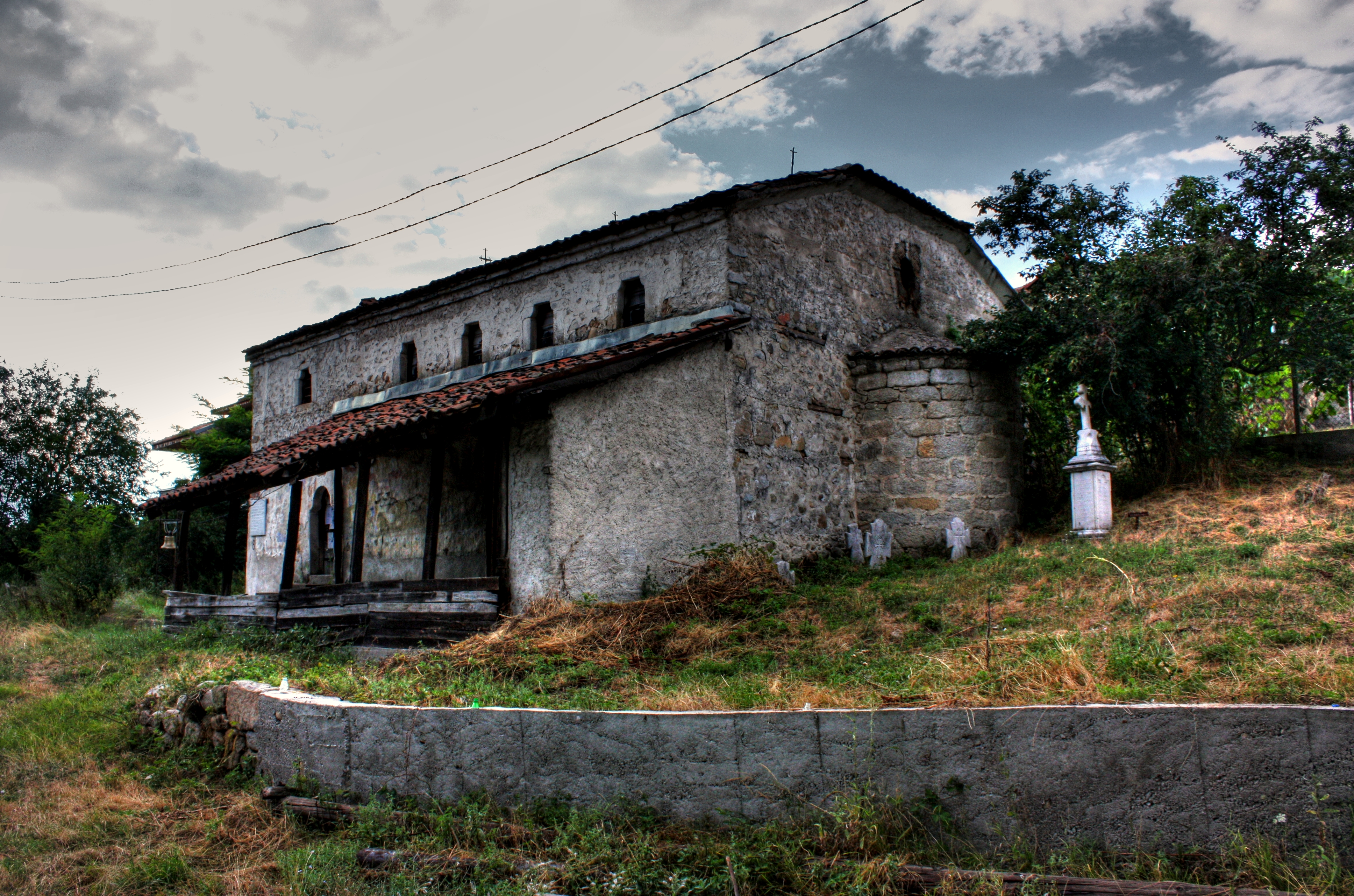 Църквата "Св. Св. Петър и Павел в село Мечкул.